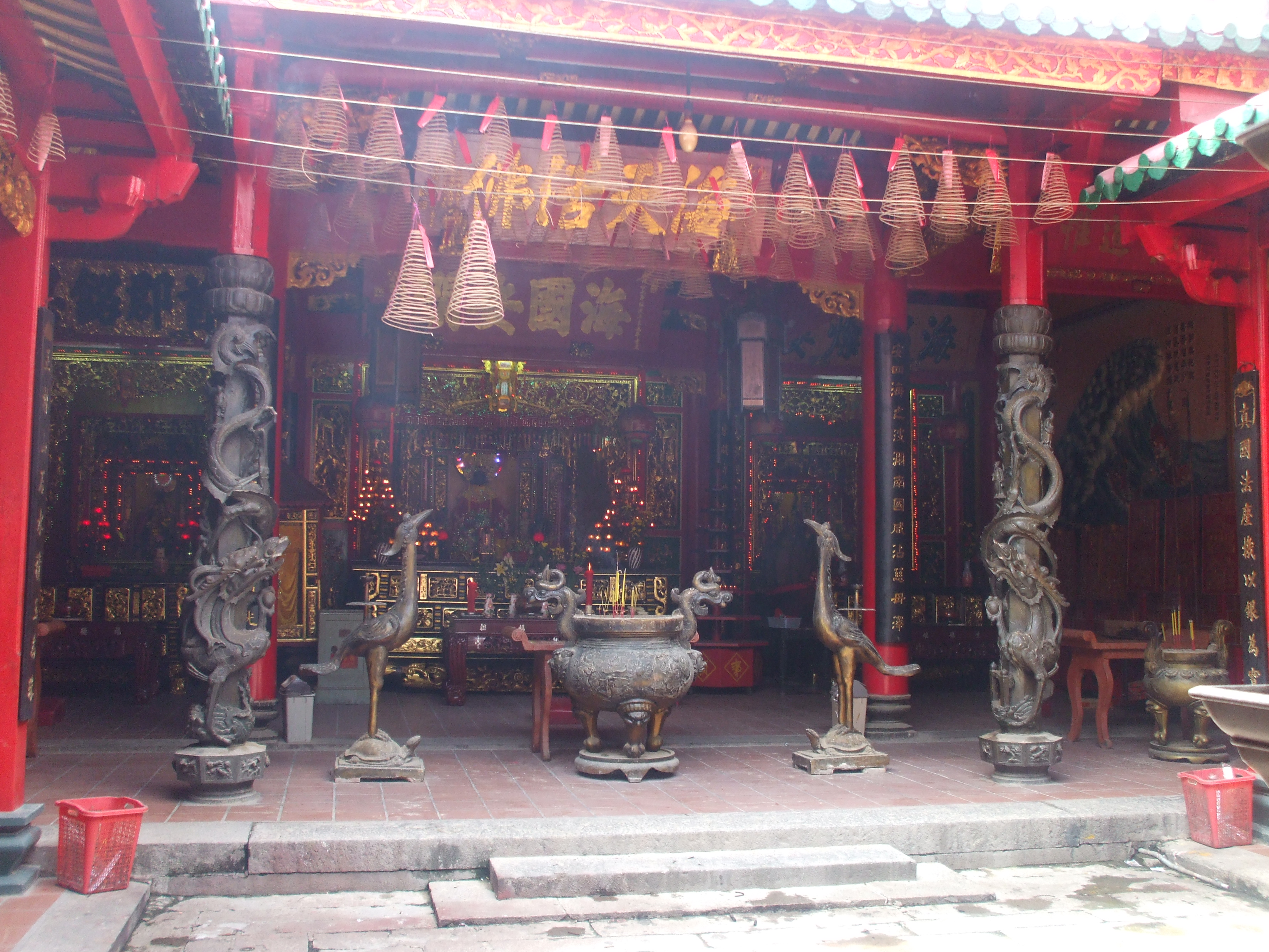 Chính điện chùa Bà Thiên Hậu (Chợ Lớn), quận 5, Thành phố Hồ Chí Minh, Việt Nam.